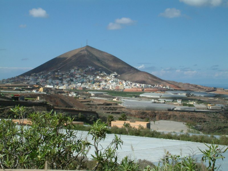 Author: Aythami Melián Perdomo email: aythami.melian [at] Description: Vista del Pueblo de Atalaya a pies de la montaña Ajodar, en la comarca noroeste de la Isla canaria de Gran Canaria.